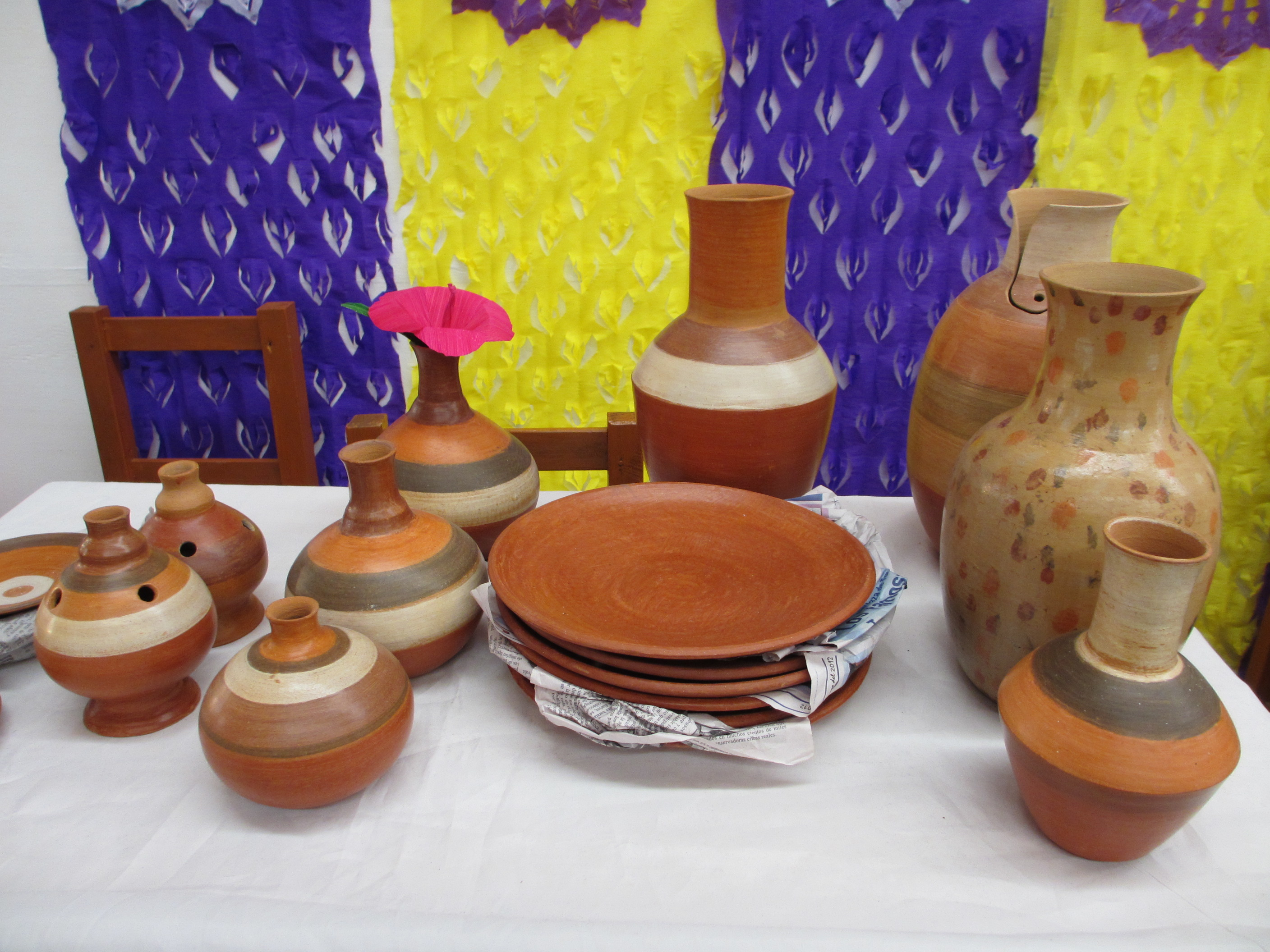 Utensilios elaborados con barro. Artesanía realizada por José Isabel Hernández García, del poblado Vernet, municipio de Macuspana, estado de Tabasco, México.